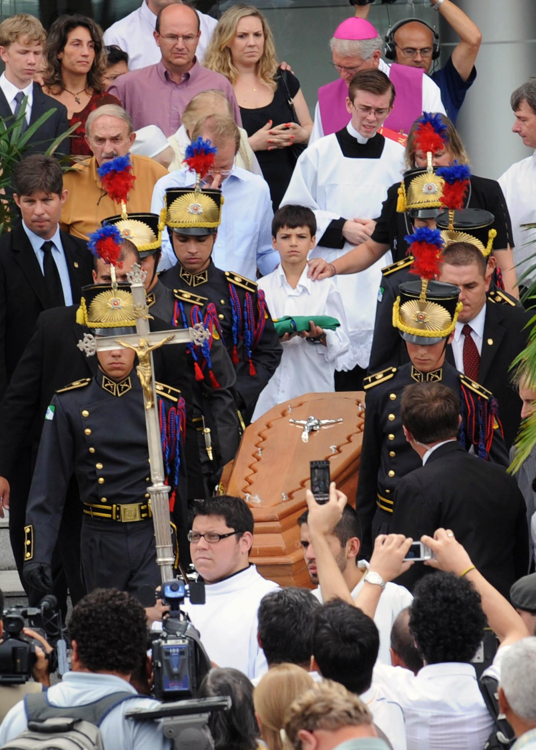 Curitiba - Soldados do Corpo de Bombeiros retiram o caixão com o corpo da médica Zilda Arns do Palácio das Araucárias, local do velório, para ser levado em carro aberto até o Cemitério Campo Verde Foto: Fabio Rodrigues Pozzebom/ABr